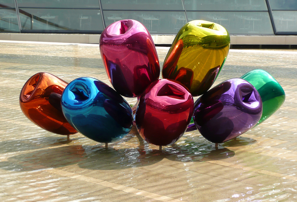 Jeff Koons: Tulips - Skulpturen aus Edelstahlguss von 2004 in der NordLB Hannover, 7 Tulpenblüten mit 4 m langen Stängeln, jede Blüte 500 kg schwer, nicht mehr am Standort in Hannover, am 15. November 2012 in New York an unbekannten Bieter versteigert für 30 Millionen US-Dollar